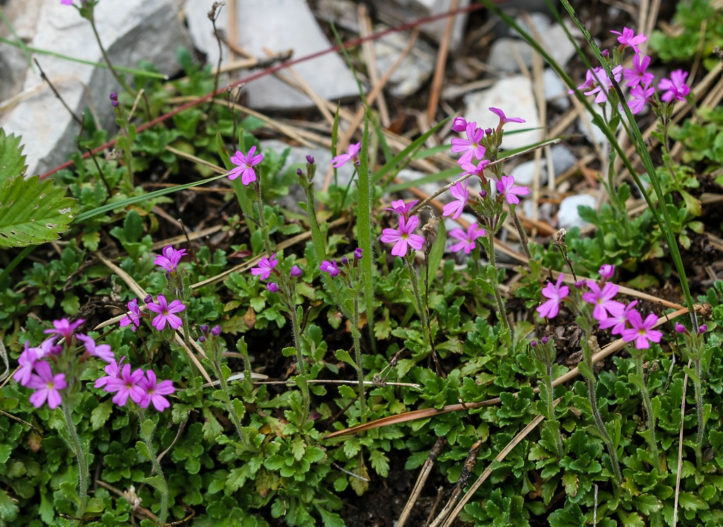 Alpengarten Villacher Alpe: Alpenbalsam